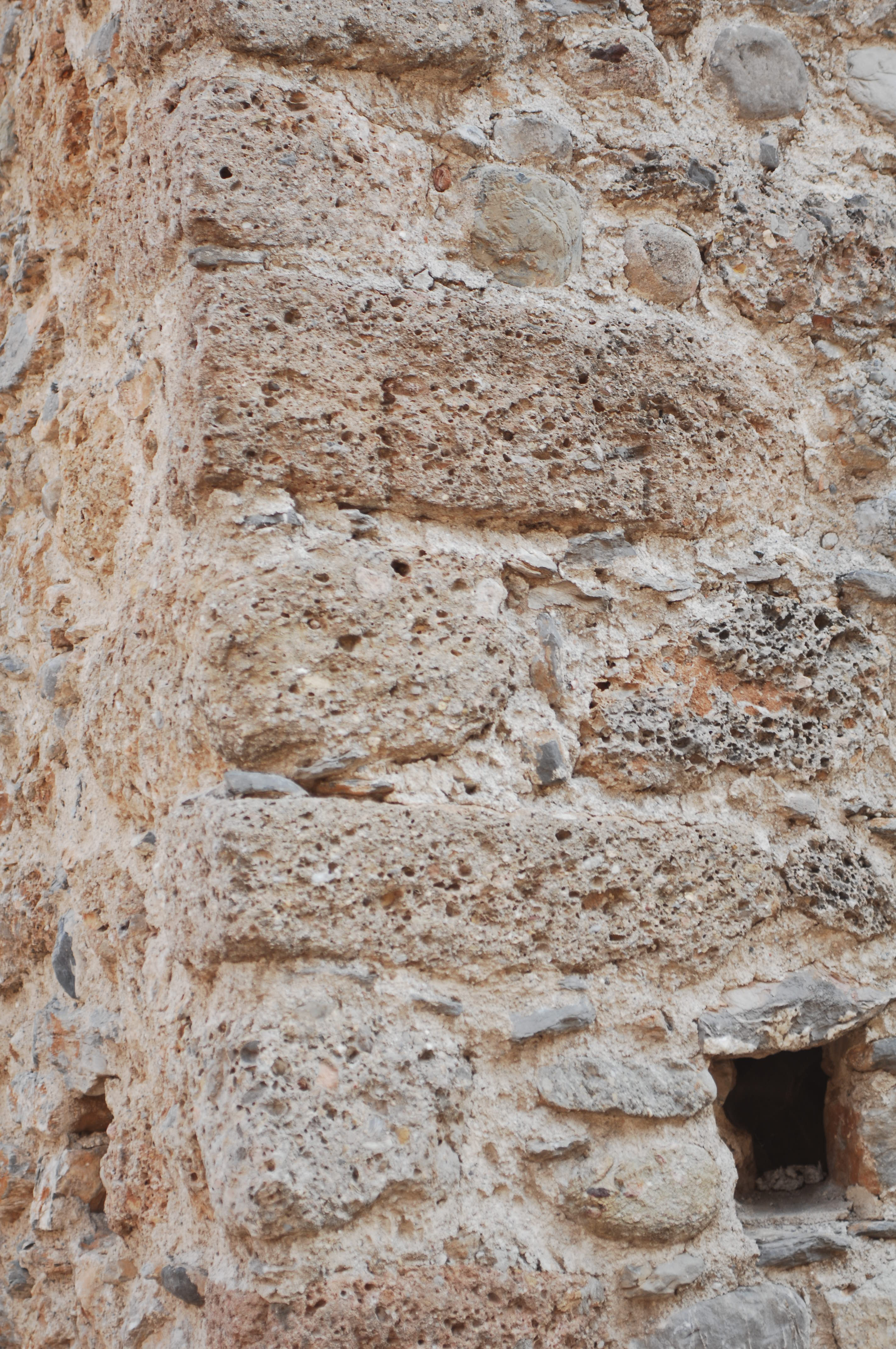 pilastri in pietra di Cisano sul Neva